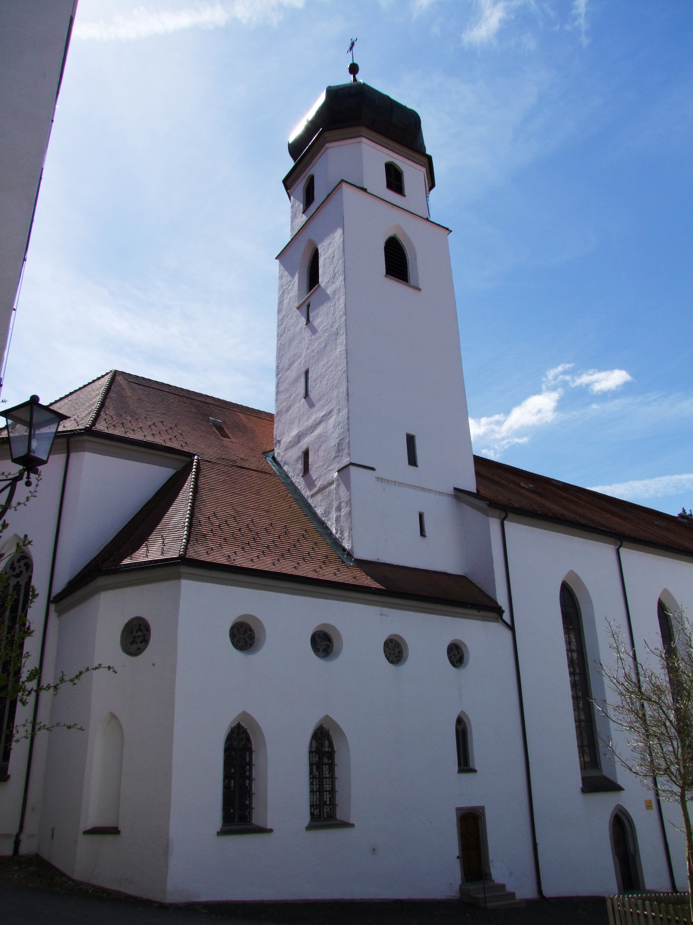 St. Martin in Leutkirch im Allgäu